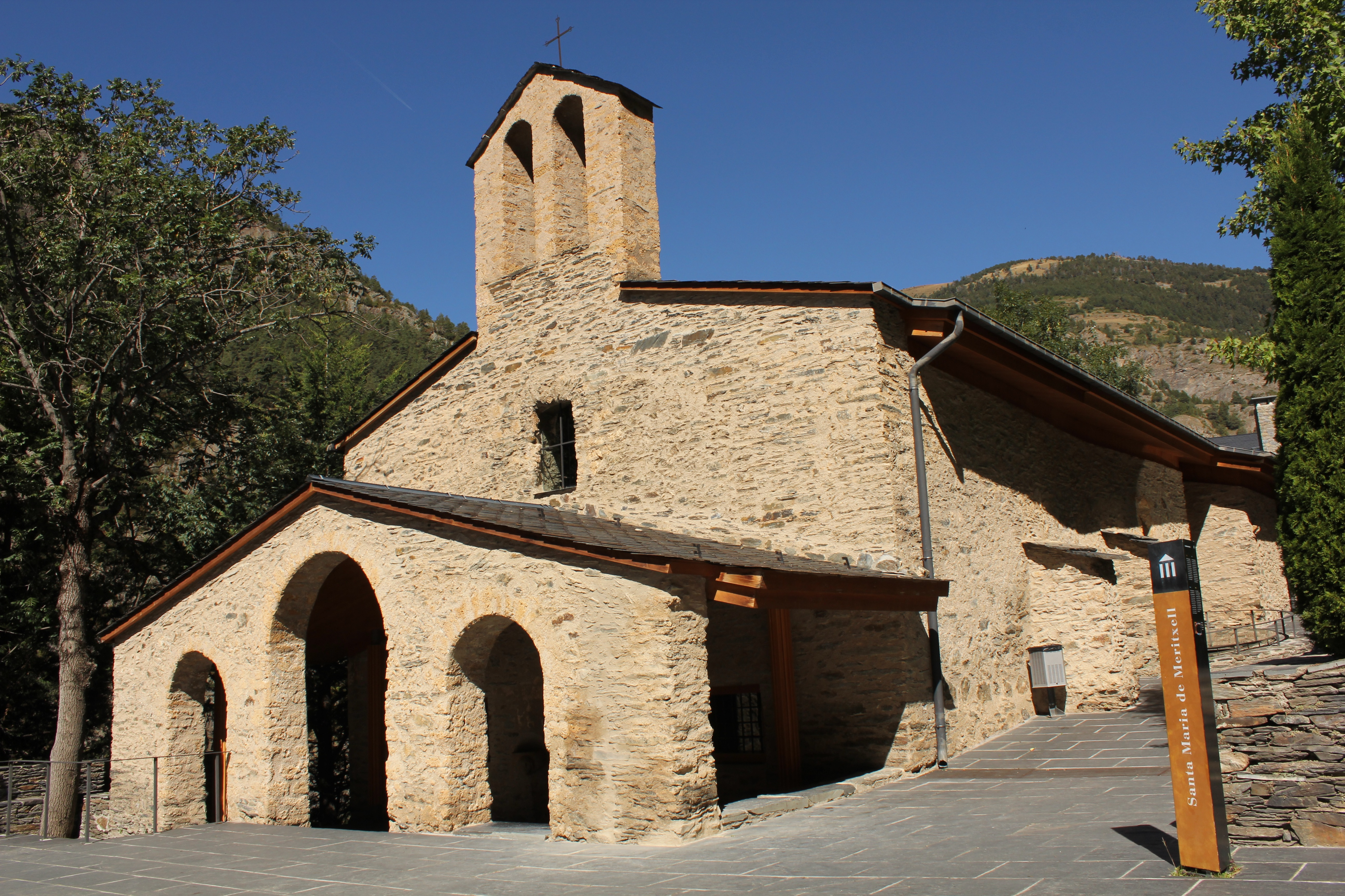 Santuari vell de Meritxell